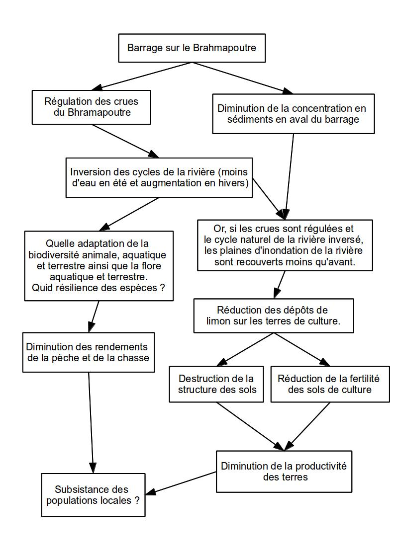 Schéma représentant les impacts de la construction d'un barrage hydroélectrique sur le Brahmapoutre pour la région d'Assam